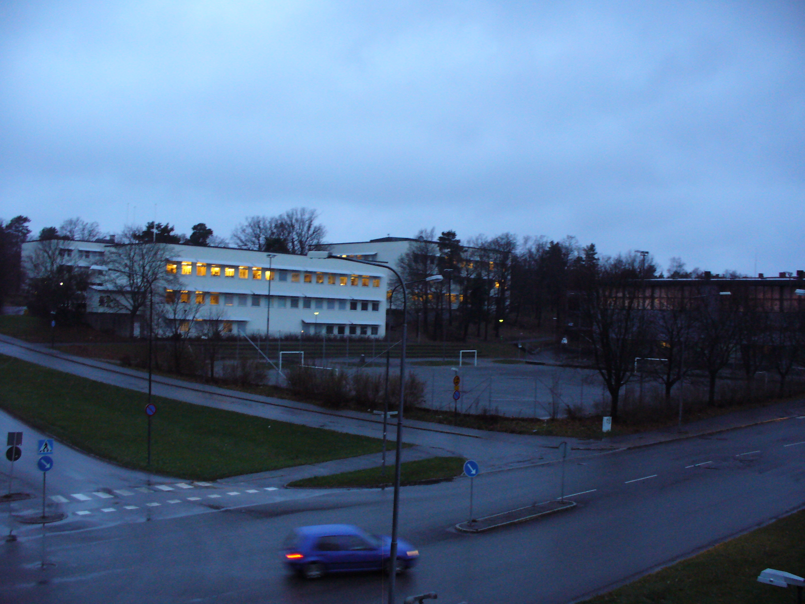 Gångsätra School, Lidingö, Sweden.